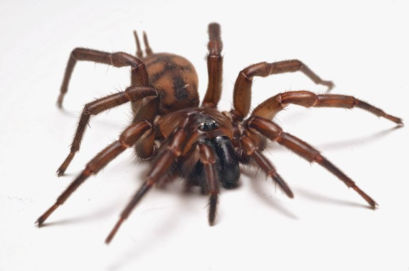 Hexathele hochstetteri Female